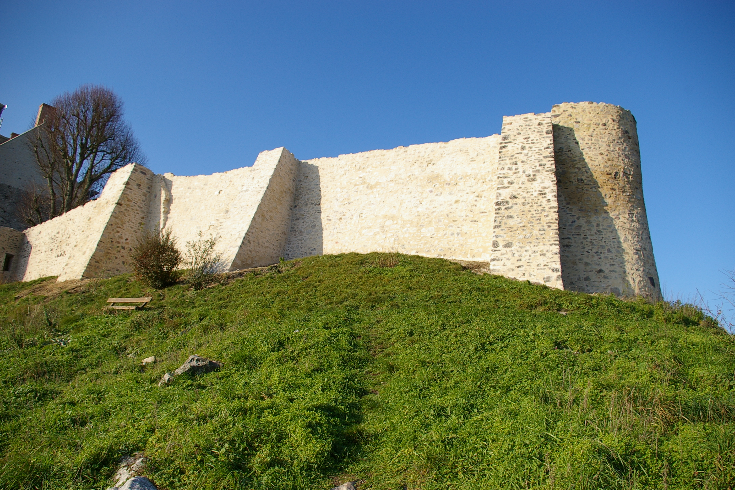 Remparts de Sainte-Suzanne (Mayenne - France) restaurés en 2006. Côté est.